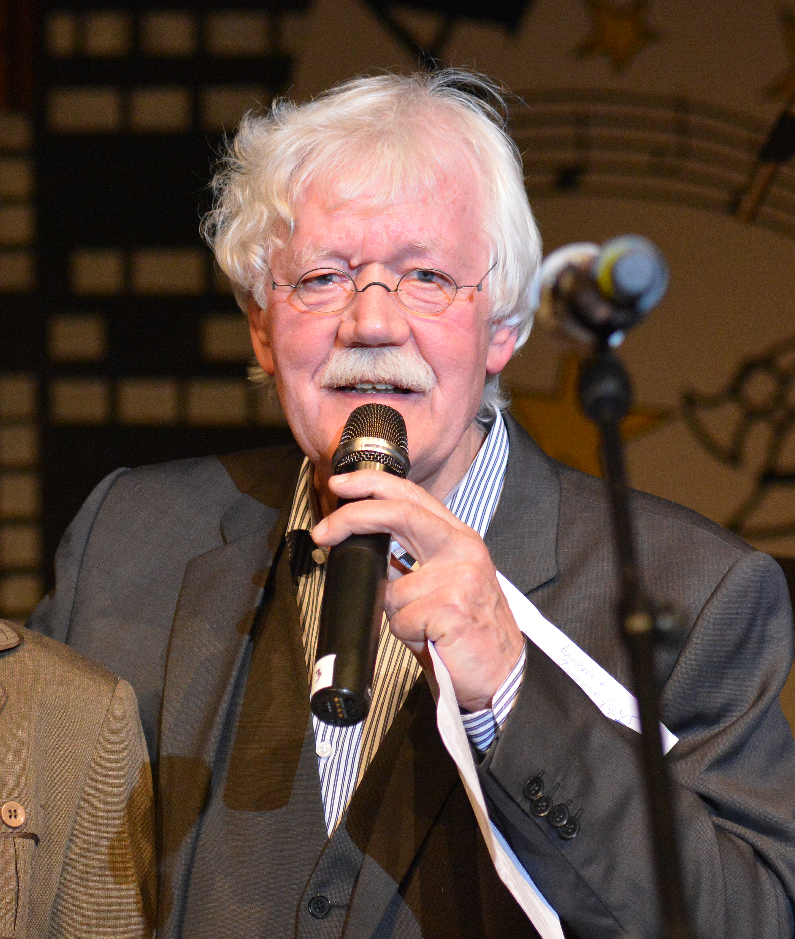 Carlo von Tiedemann bei Appen musiziert 2014